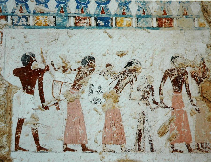 Nubierinnen, Wandmalerei aus dem Grab des Ineni (TT81)